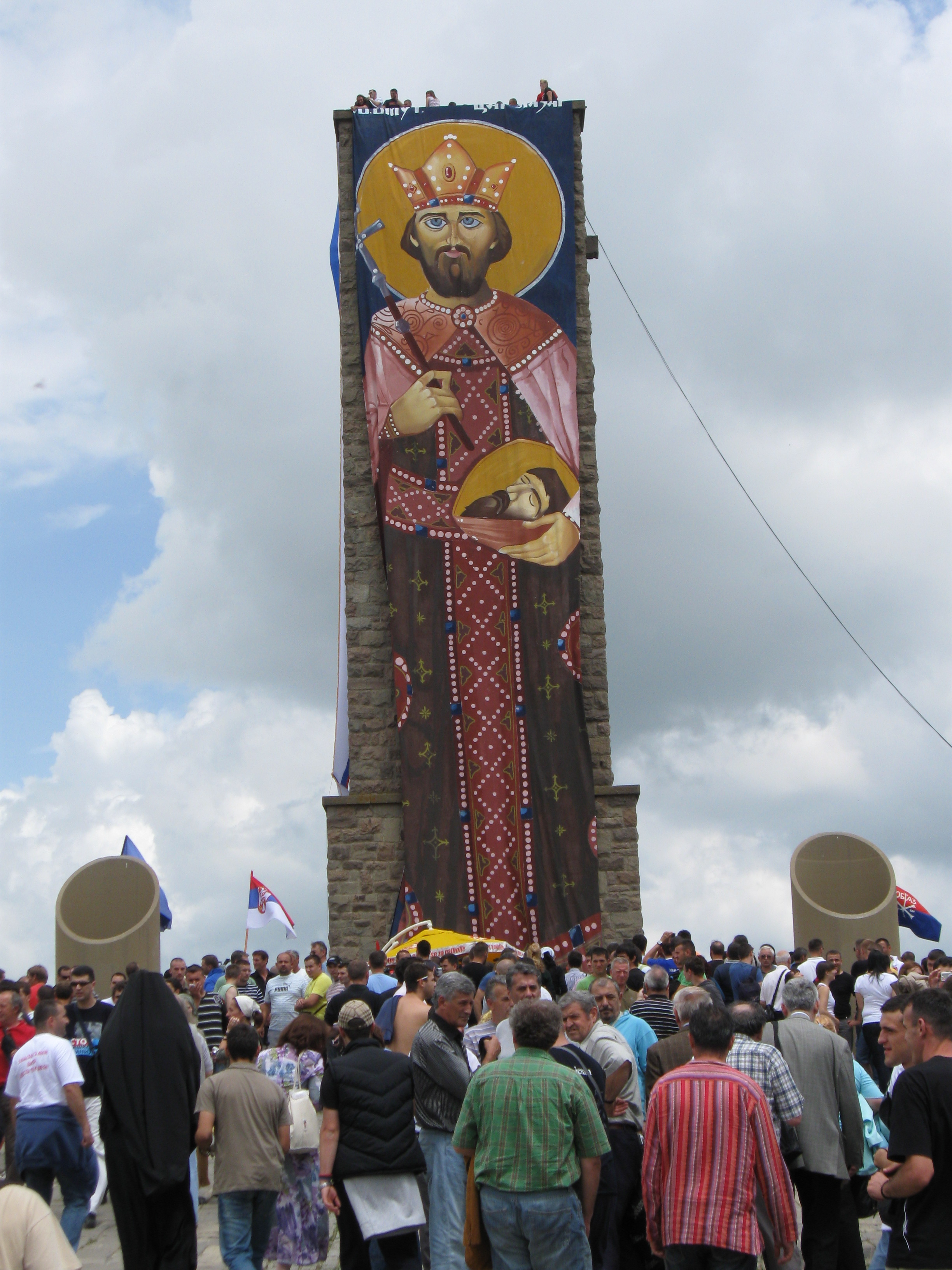 Gazimestan Monument on Vidovdan, 2009